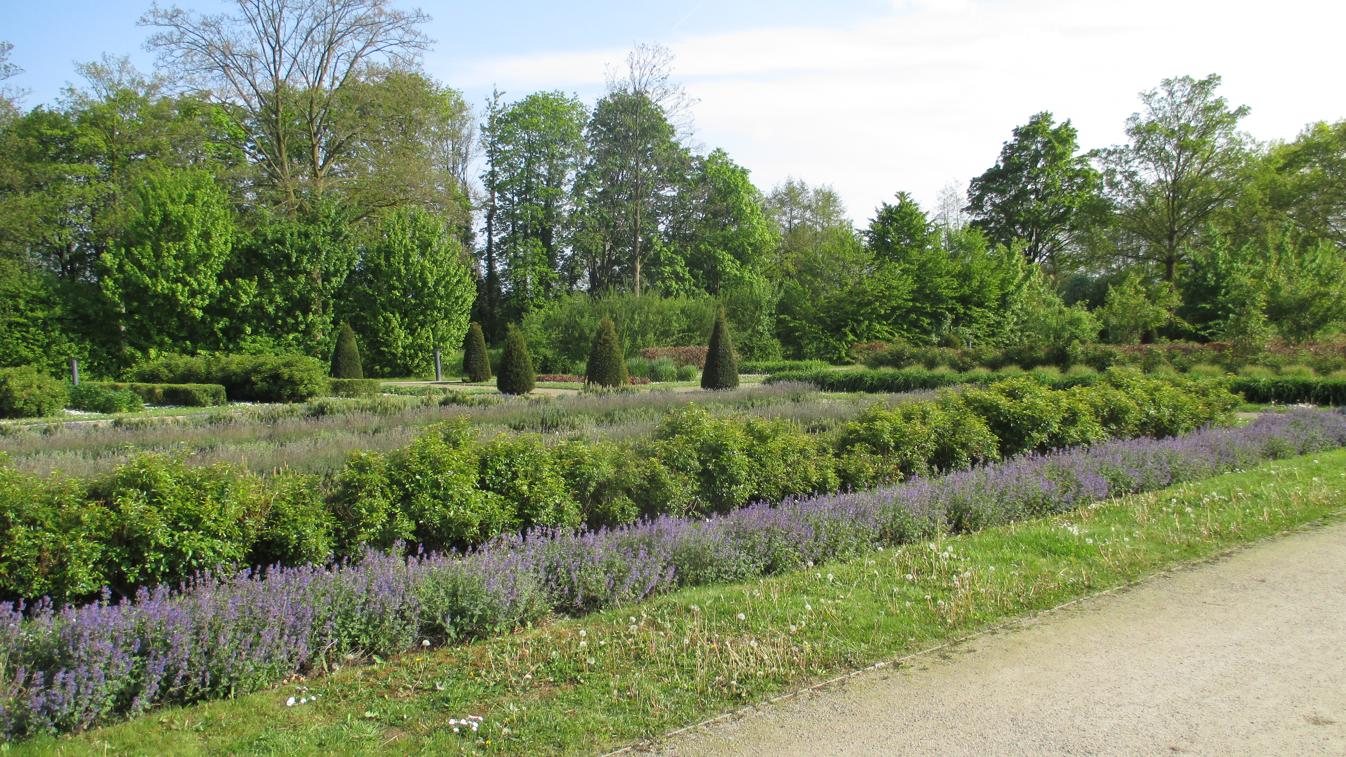 Beet mit blau und silber blühenden Pflanzen und Gehölzen, darunter Lavendel, Katzenminze und Bergkiefern.